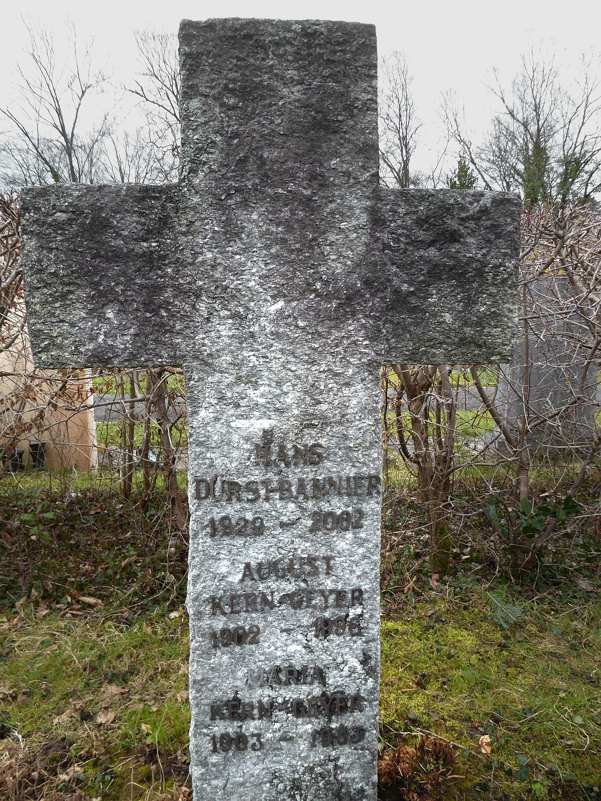 August Kern-Geyer (1902–1996) Regisseur, Produzent, Drehbuchautor, Kameramann, Filmverleiher Chemiker, Grab auf dem Friedhof Hörnli, Riehen, Basel-Stadt